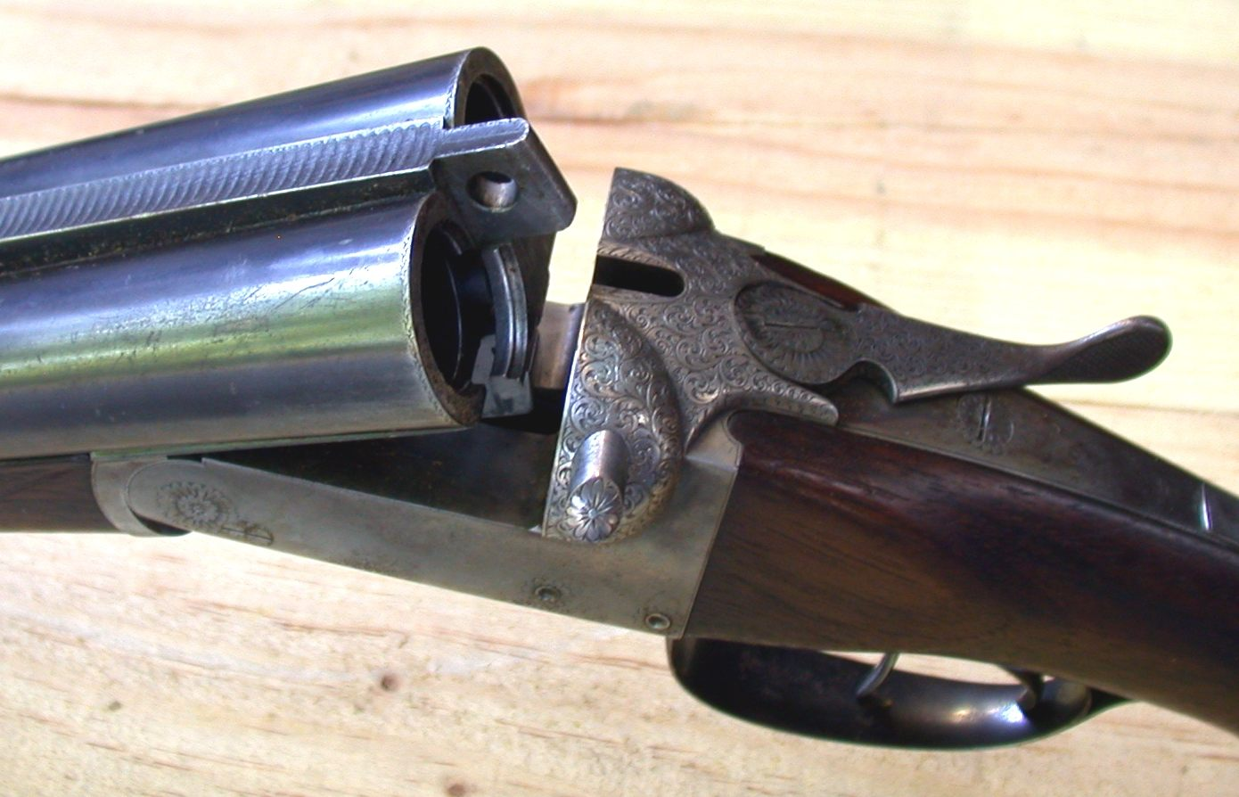 Flinten-Schlosskasten